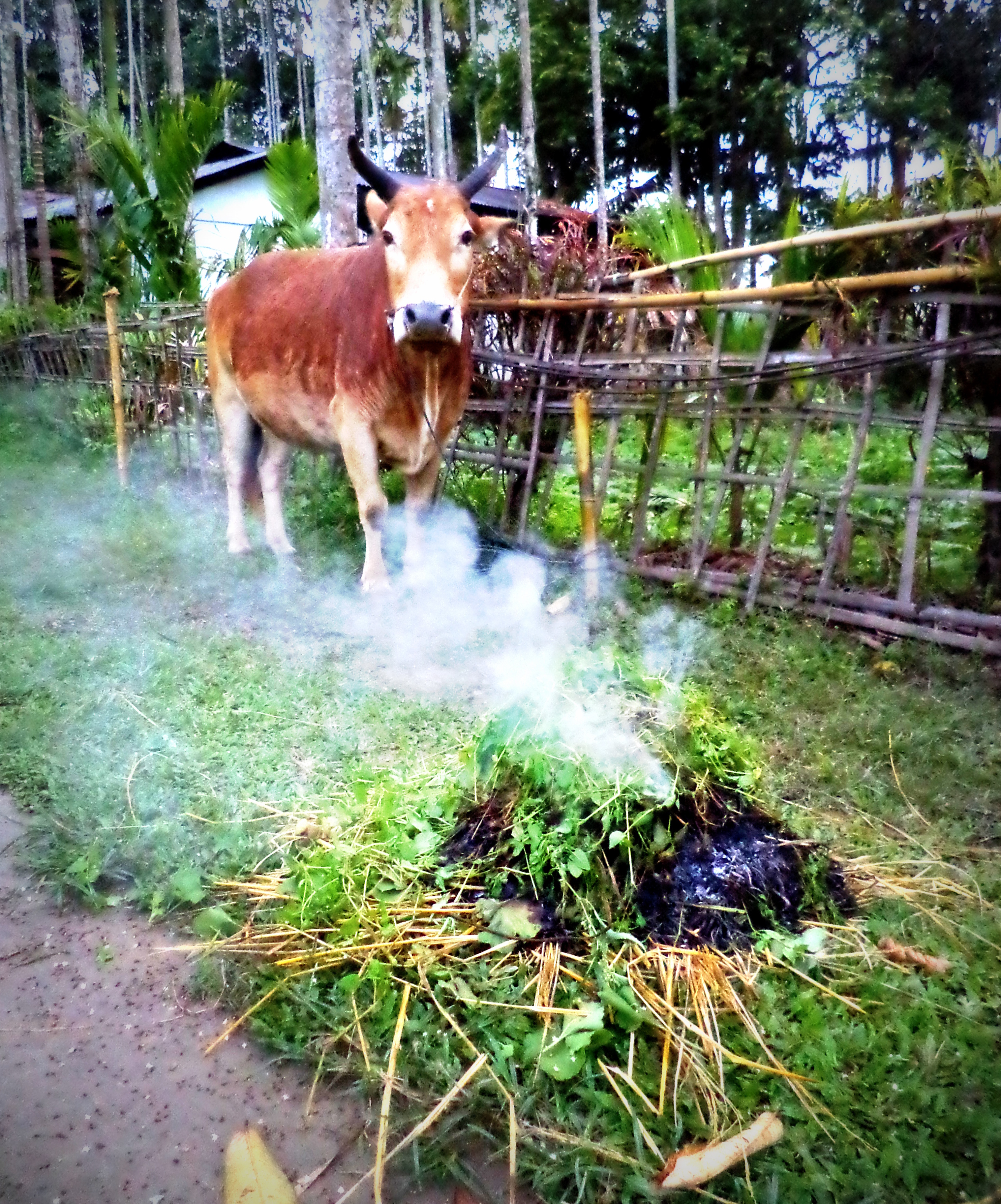 অসমীয়া: গৰু বিহুৰ দিনা সন্ধিয়া সময়ত গৰুক জাগ দিয়া দৃশ্য